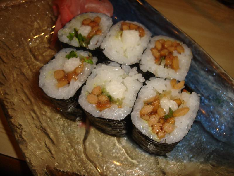 Natto Maki @ Yanagi Sushi (2006-04-22)DSC01127